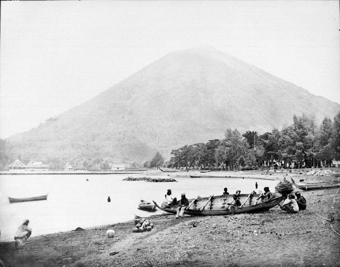 Negatief. Kustgezicht met vissersboot met op de achtergrond de Vuurberg, Bandanaira